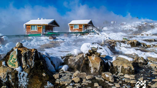 Suối nước nóng ở Shargaljuut.